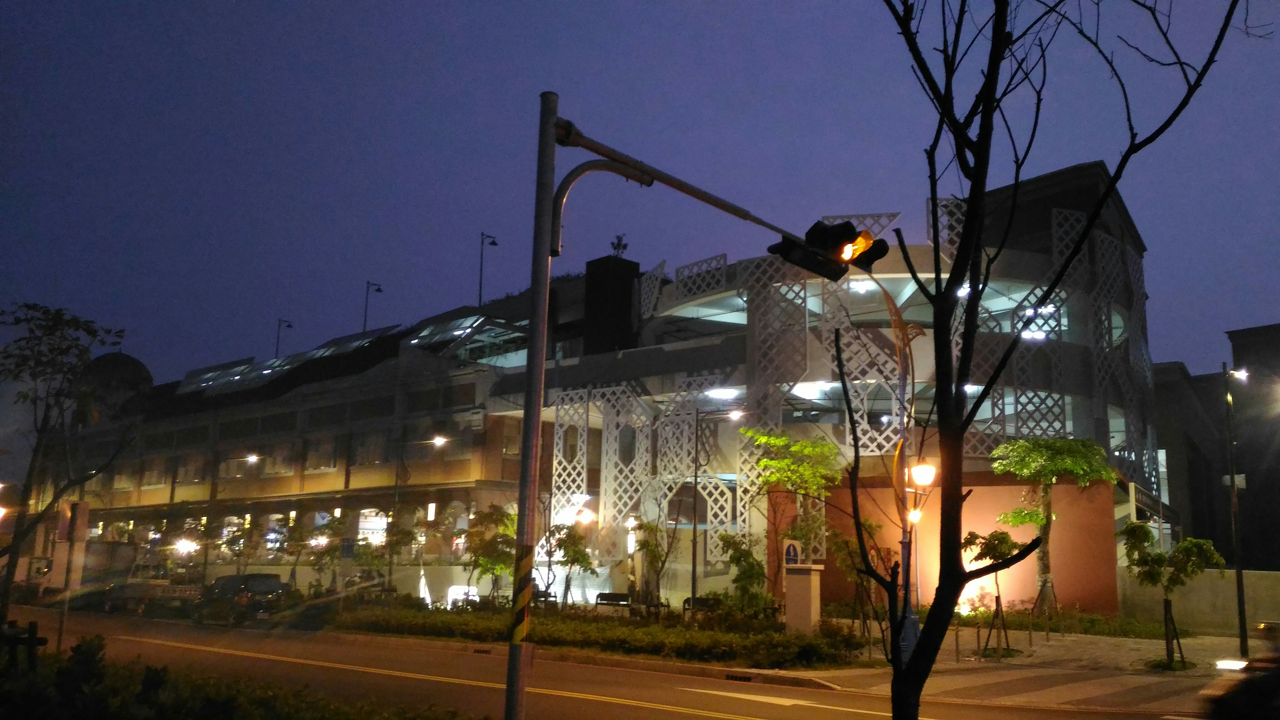 中文（台灣）: 台中建國市場清晨